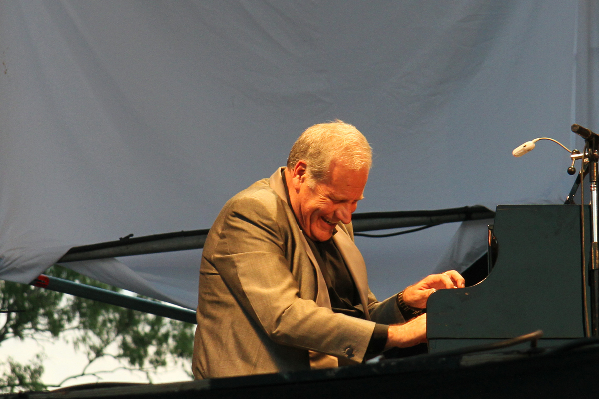 También estuvo José “Pepe” Colángelo. ( Foto: Estrella Herrera)